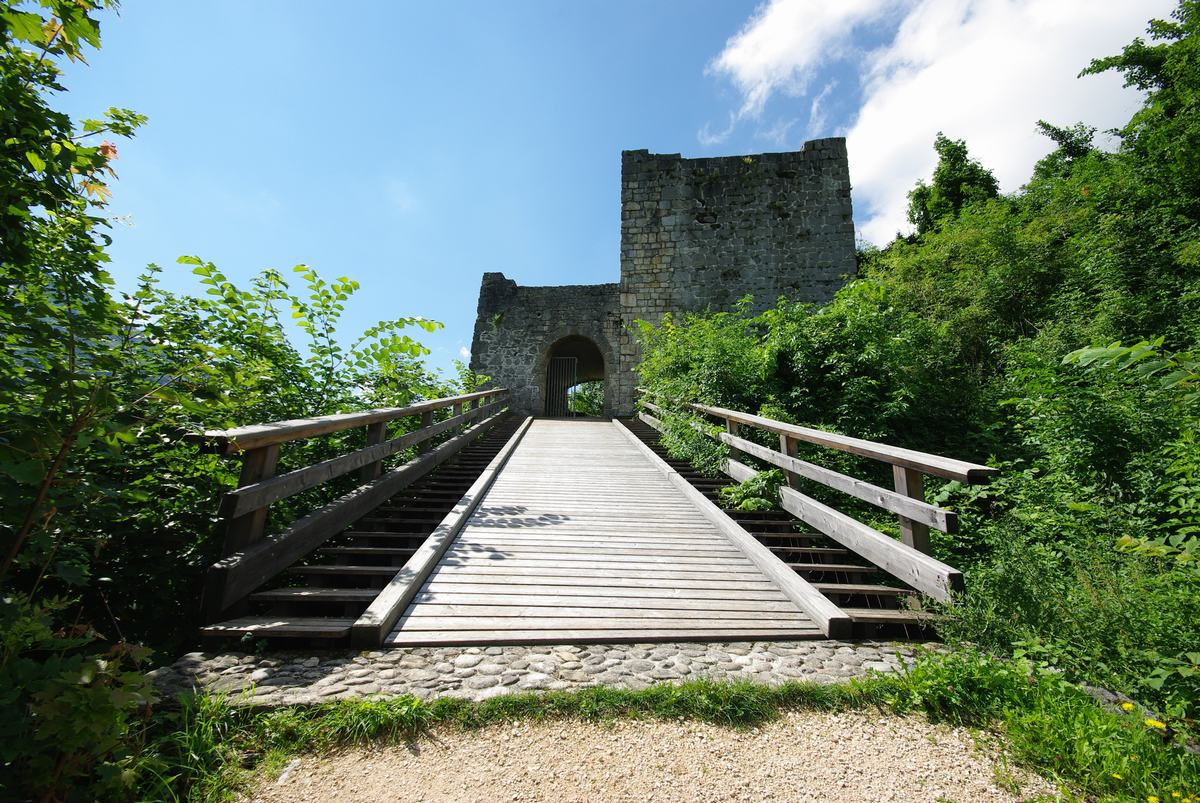 Plainburg, das Torhaus von außen.